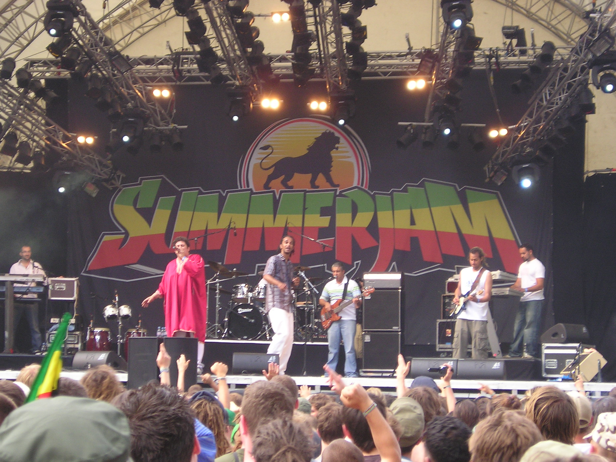 La scène du SummerJam Festival lors de l'édition 2009.